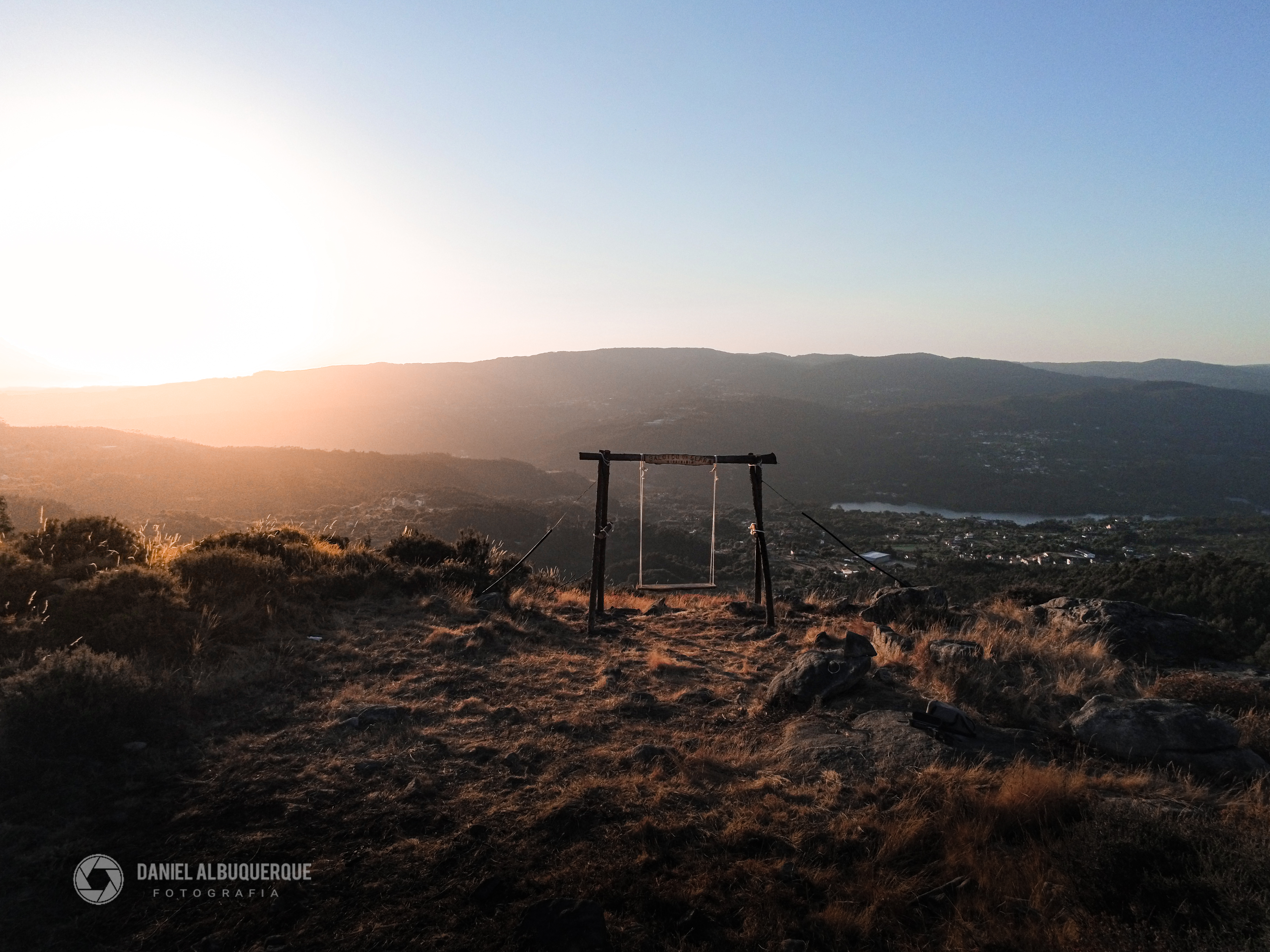 Fotografia:Daniel Albuquerque